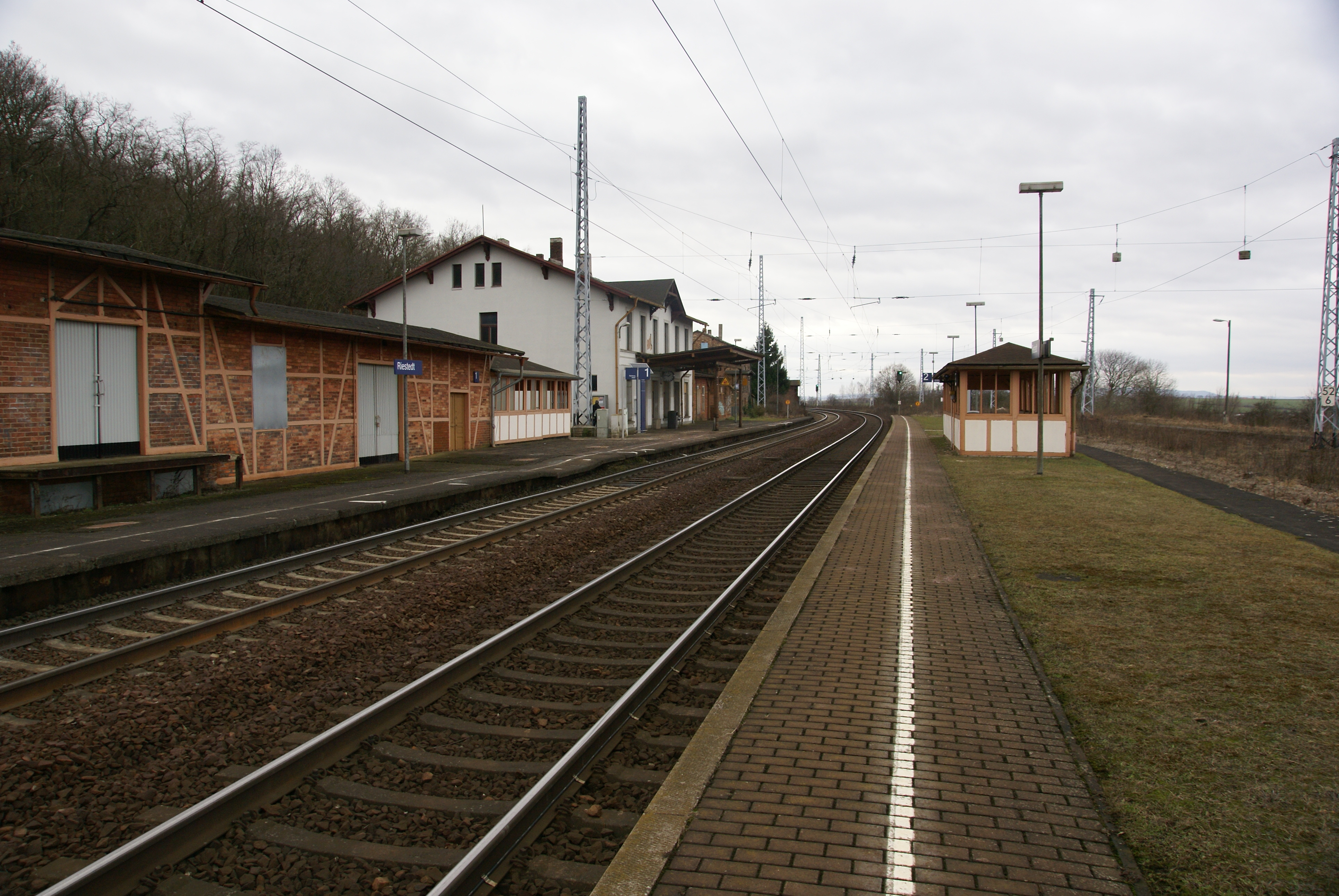 der Bahnhof von Riestedt